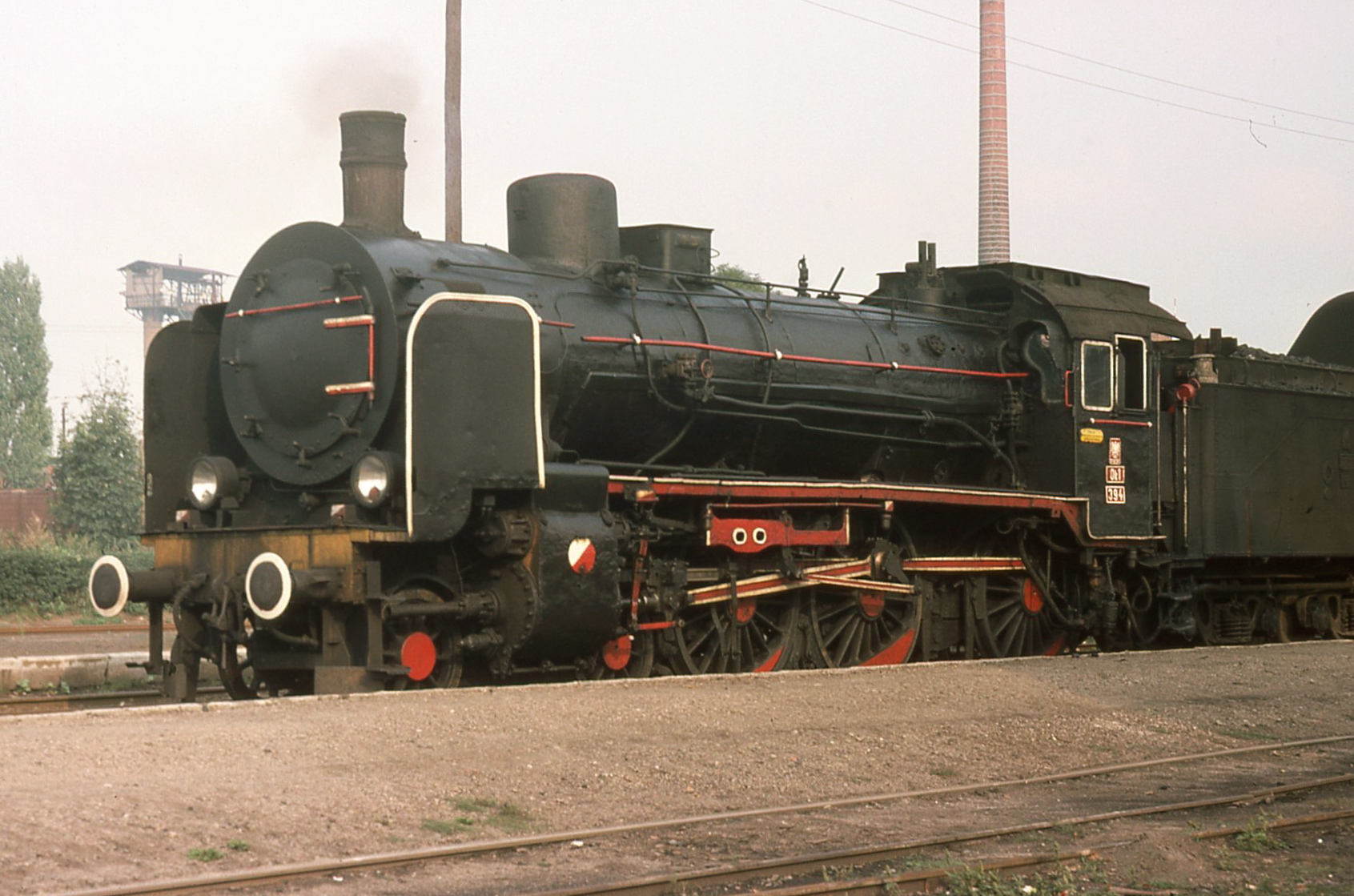 Ok1-394